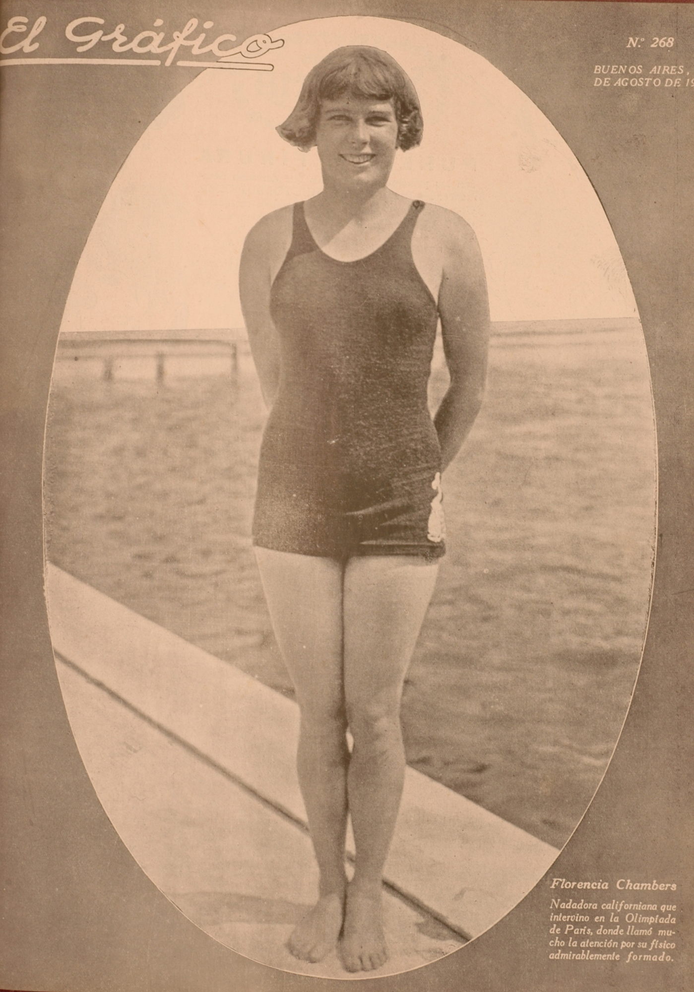 El Grafico del 23 de Agosto de 1924. Edicion 268